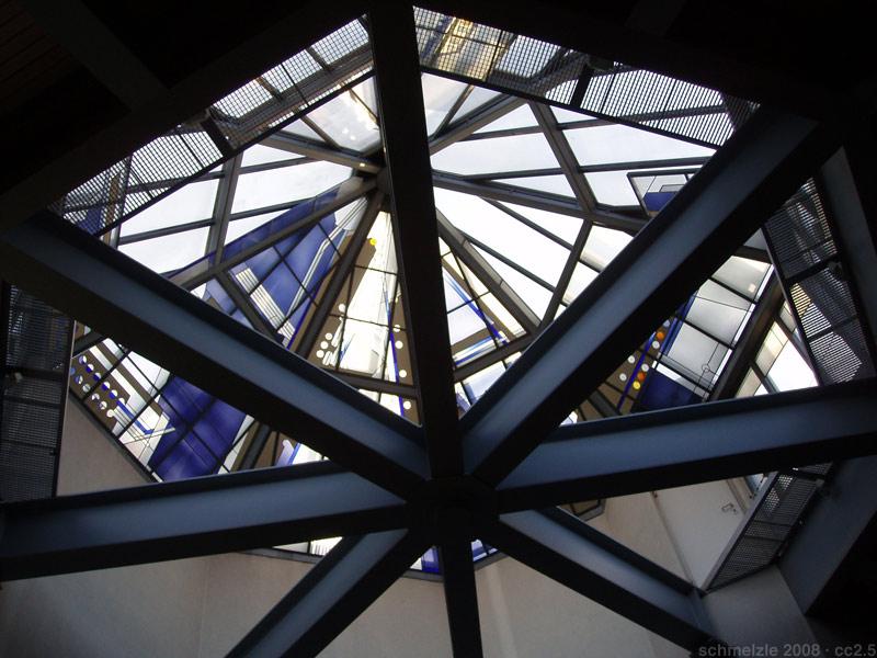 Chorturm der Katholischen Pfarrkirche Heilig Kreuz im Kreuzgrund in Heilbronn-Böckingen